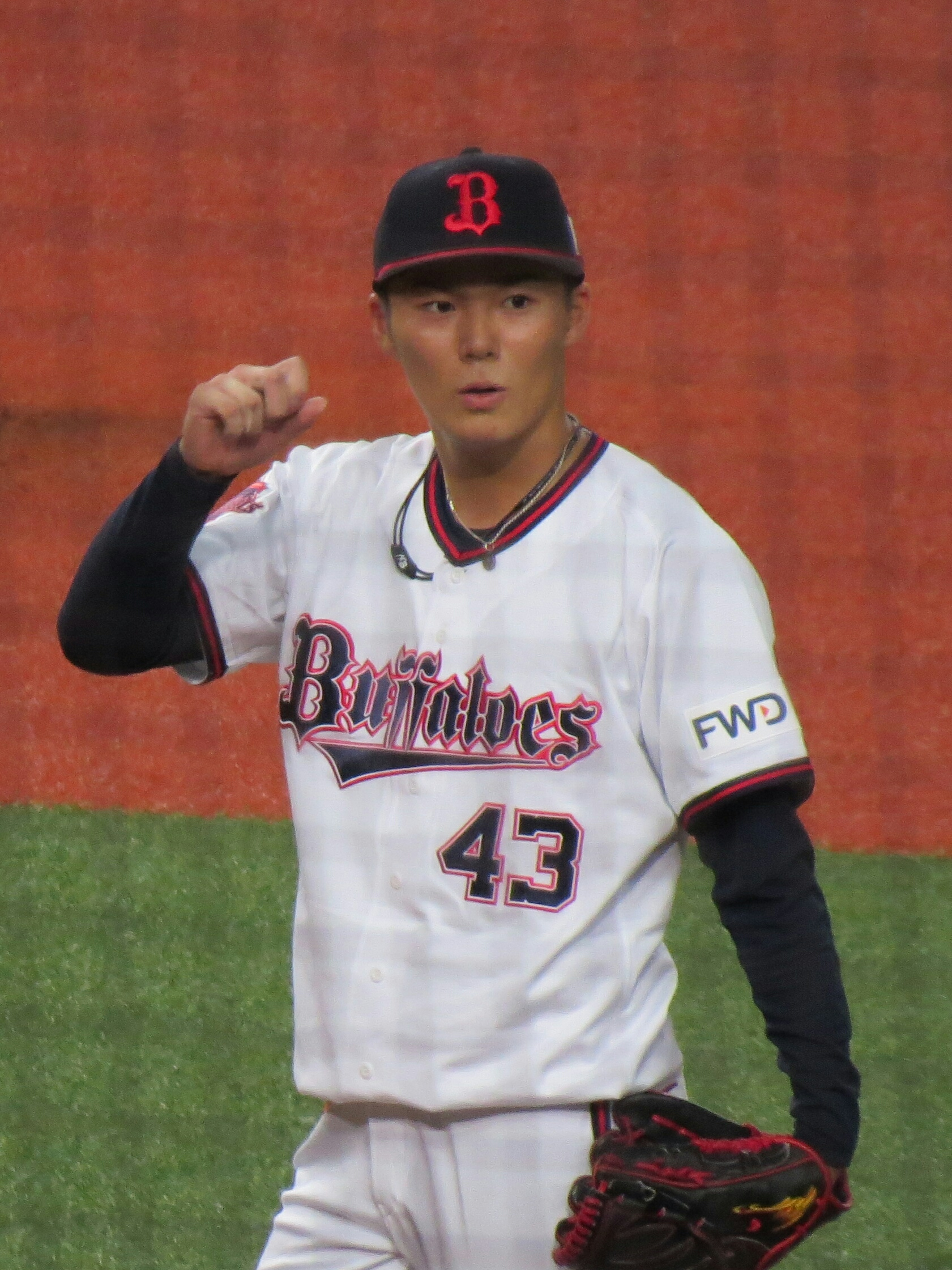 山本由伸2019092202